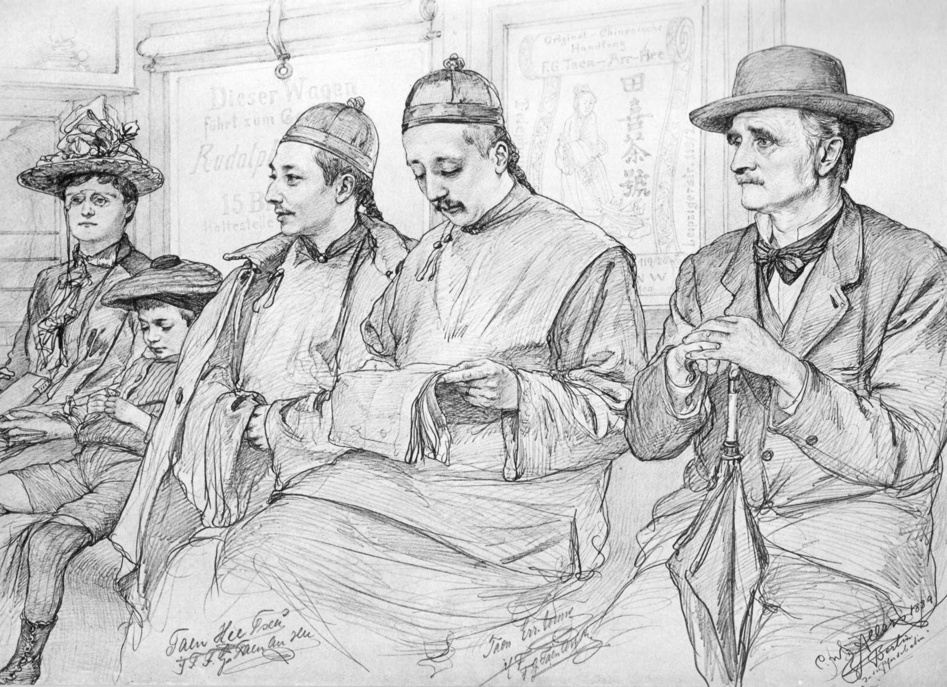 in der Pferdebahn in Berlin. In der Mitte Angehörige der Firma F. G. Taen-Arr-Hee (siehe Werbung im Hintergrund sowie Kommentar von Klaus J. Lemmer in der 1979er Ausgabe der Spreeathener, dort Nr. 13). Der Herr rechts ist C.W. Allers' Vater Heinrich Christian Allers (1824-1898). Allers hat die Porträts vermutlich an einem anderen Ort als abgebildet gezeichnet.